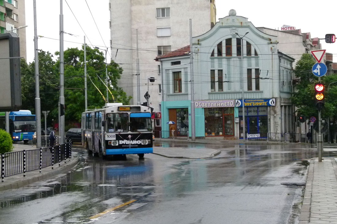 ЗиУ-682